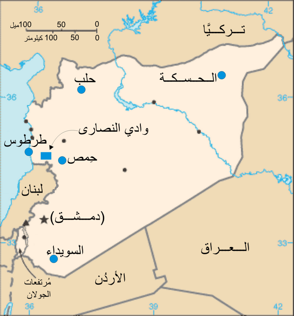 خارطة تُبيِّنُ الأماكن المذكورة في مقالة المسيحيَّة في سوريا.